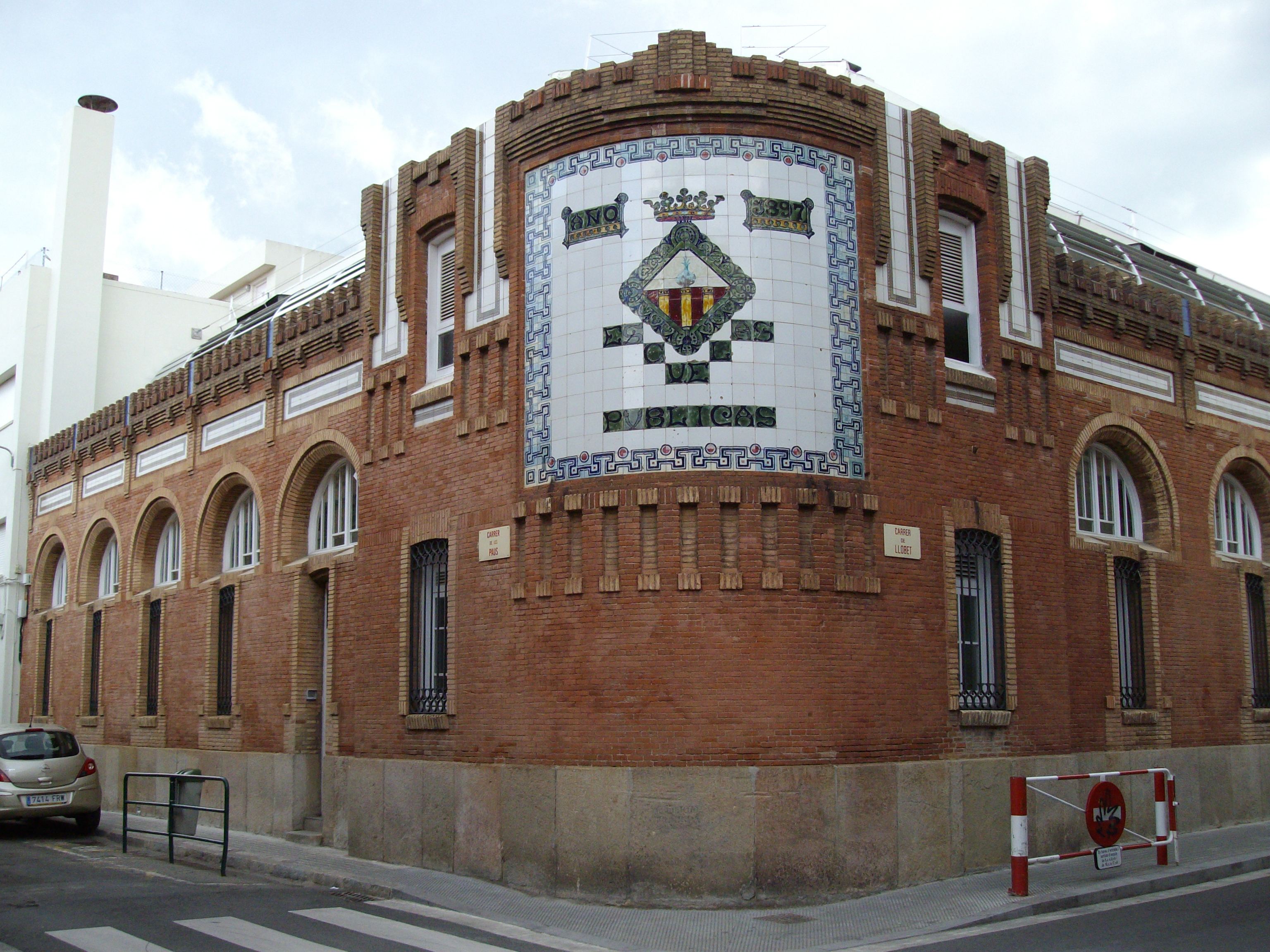 Edificio construido por Juli Batllevell en 1897, situado en la calle Llobet, 77, de Sabadell, Barcelona (España).